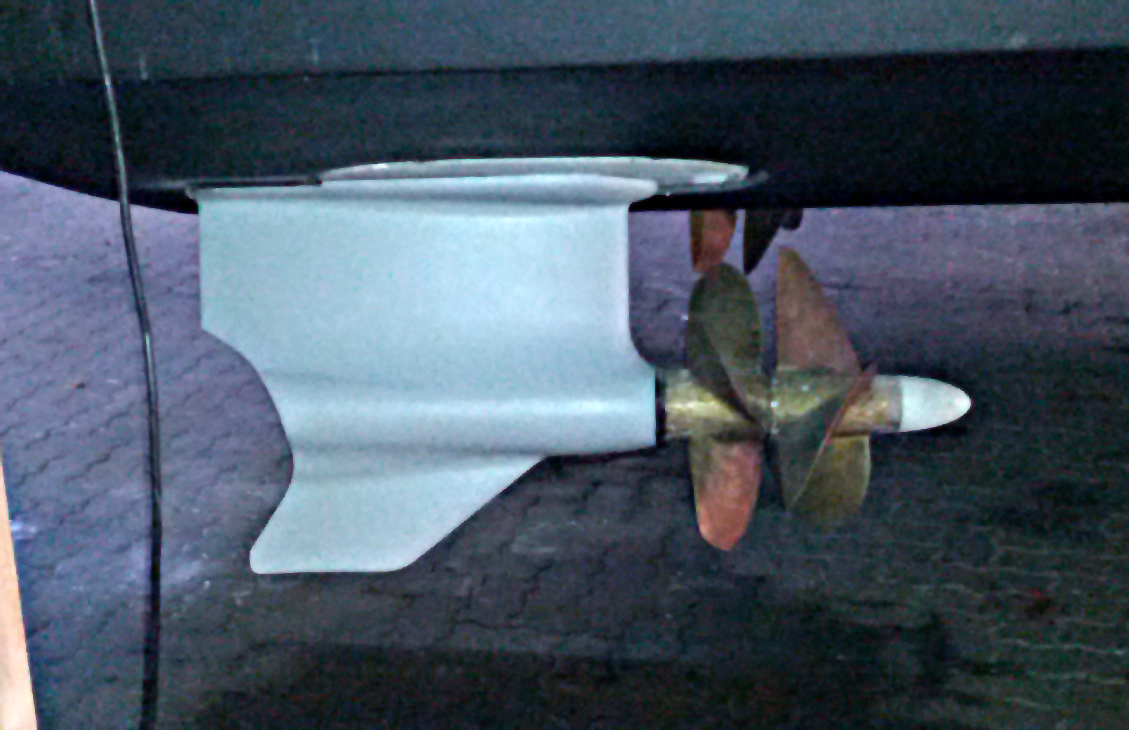 Variation des Schottel-Antriebes unter dem Heck einer 15-Meter-Yacht. Besonderheit sind die vorne liegenden Koaxial-Doppelpropeller.